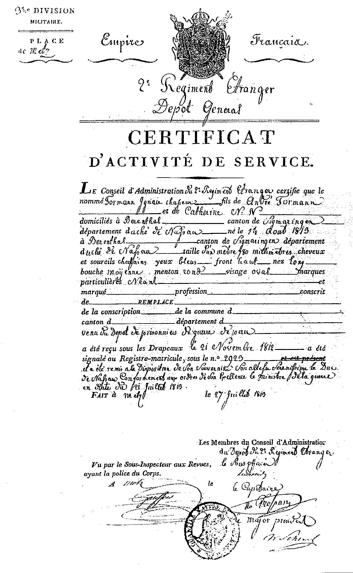 Wehrdienstbescheinigung vom 27. Juli 1819